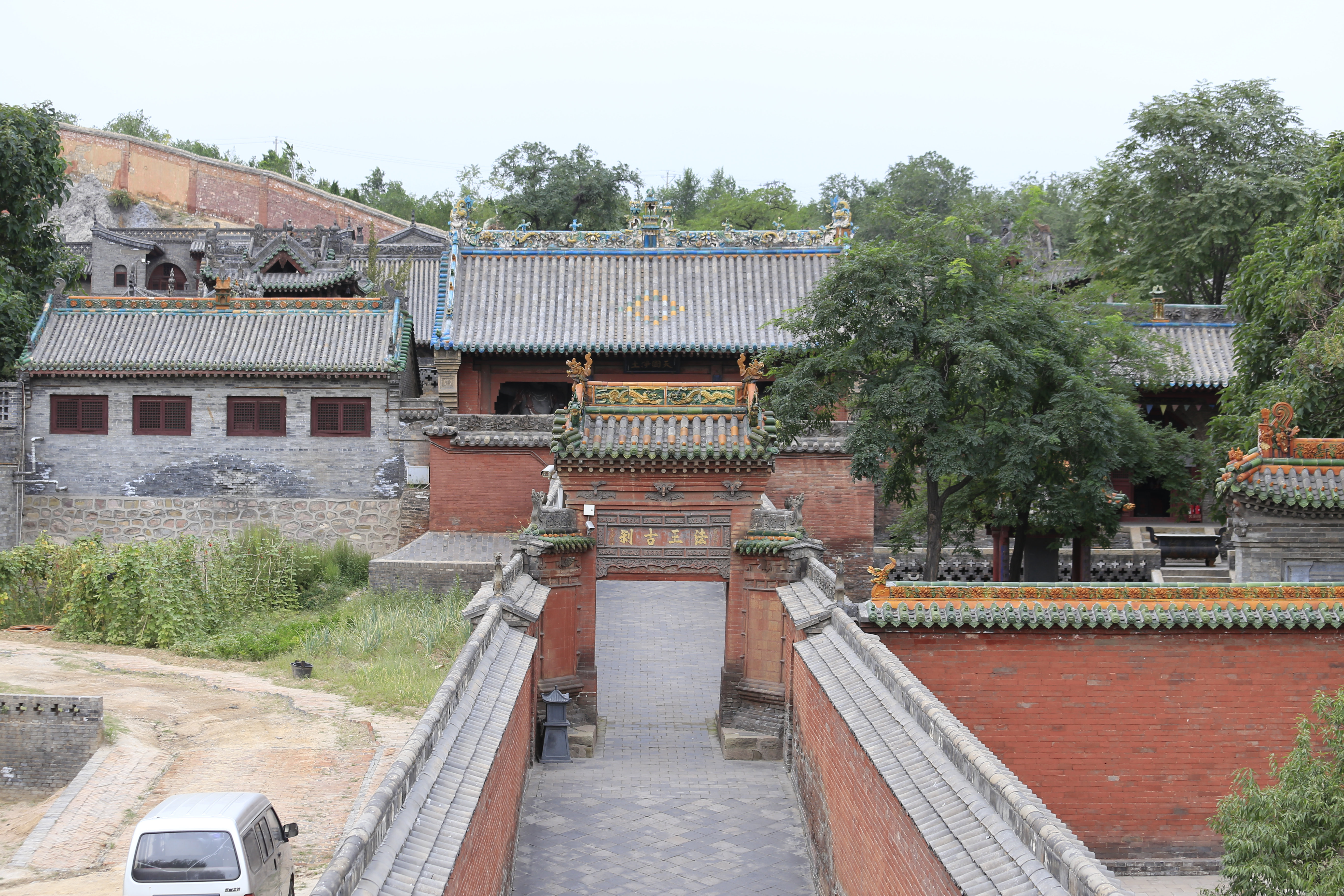 灵石县资寿寺 —— 近处为明代砖坊，远处为元代山门